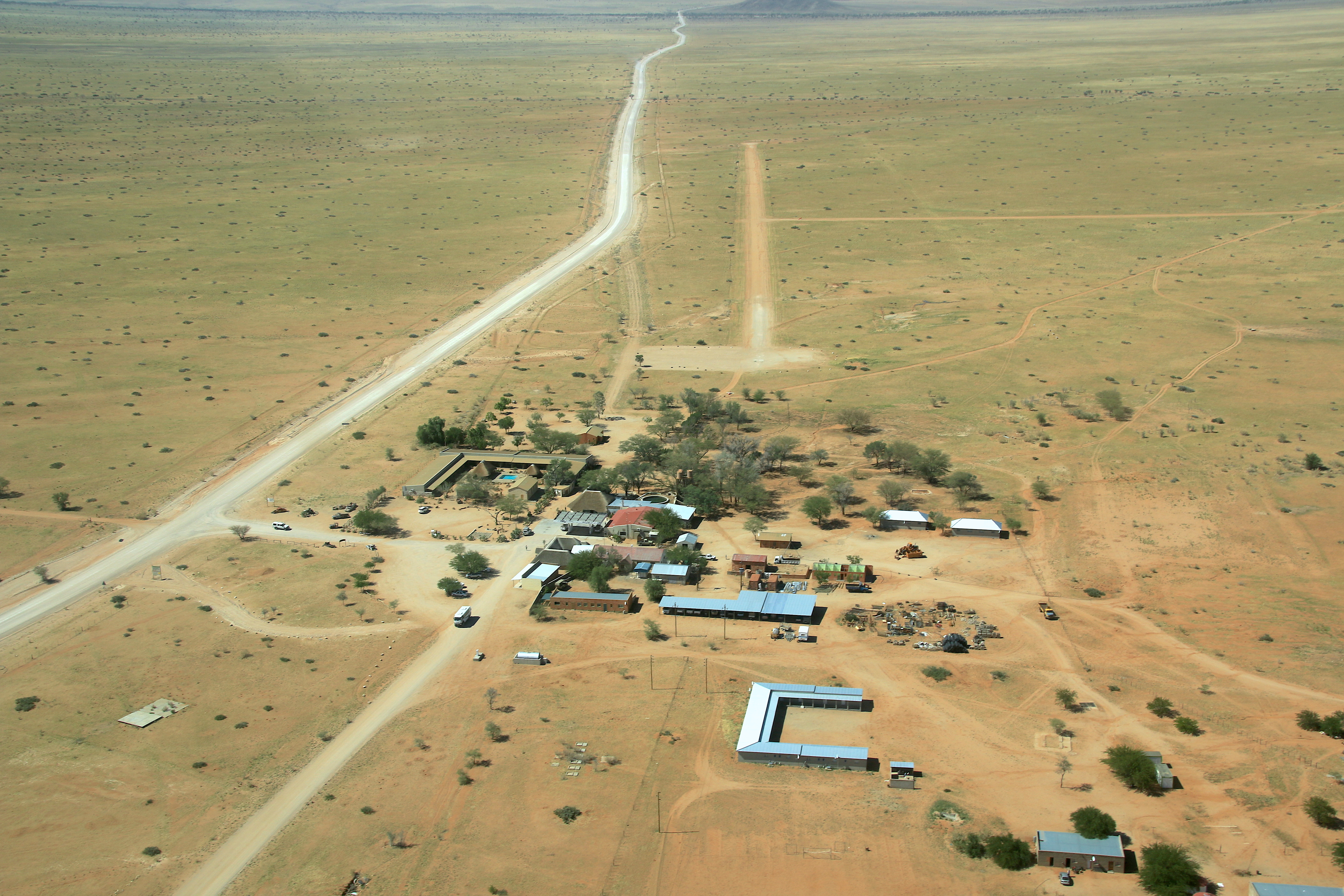 Solitaire (2019)